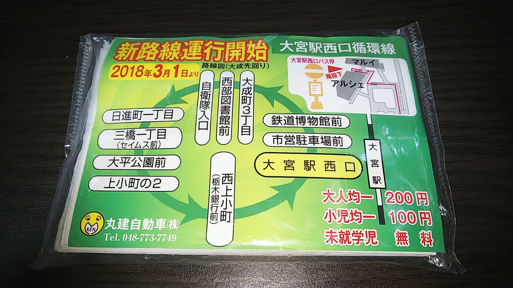 大宮駅西口循環線（大成先回り）が、2018年3月１日に開業したときに配布された路線図付ポケットティッシュ。